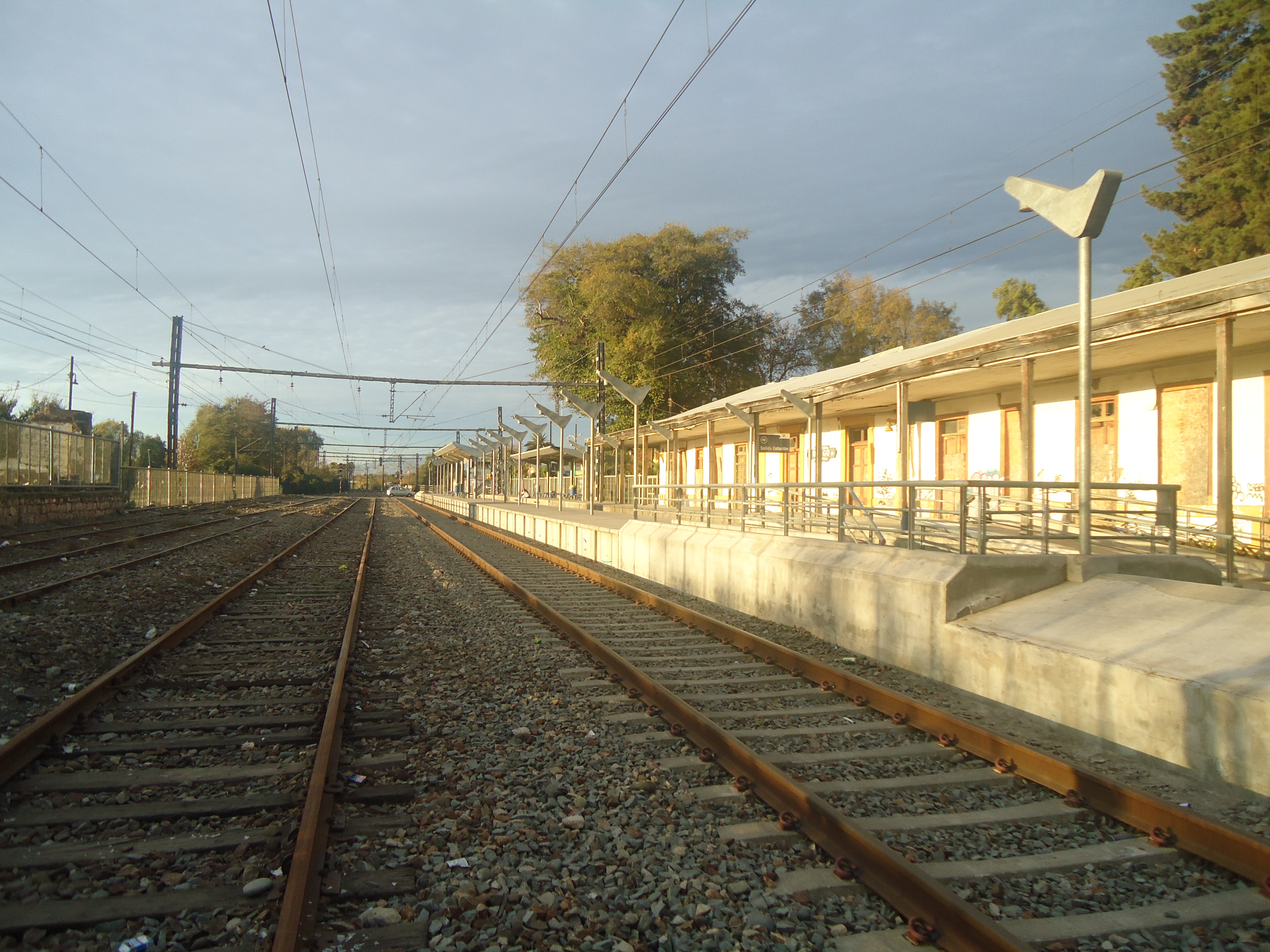 Estación de Ferrocarriles de Rengo, mayo 2018.